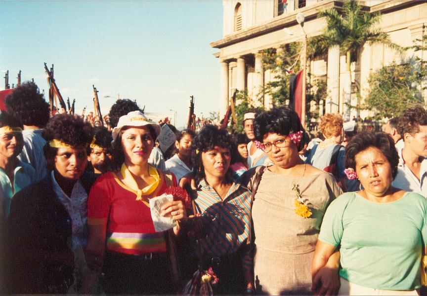 Celebración del Día Internacional de la Mujer Trabajadora en Managua, Nicaragua, America Central en 1988.